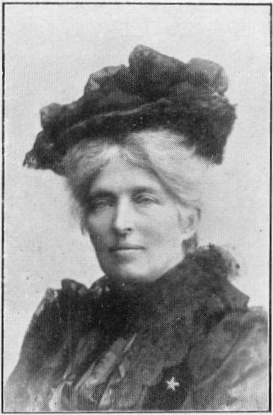 Rosa Junck L. K., Bordighera, profesorino de lingvoj.